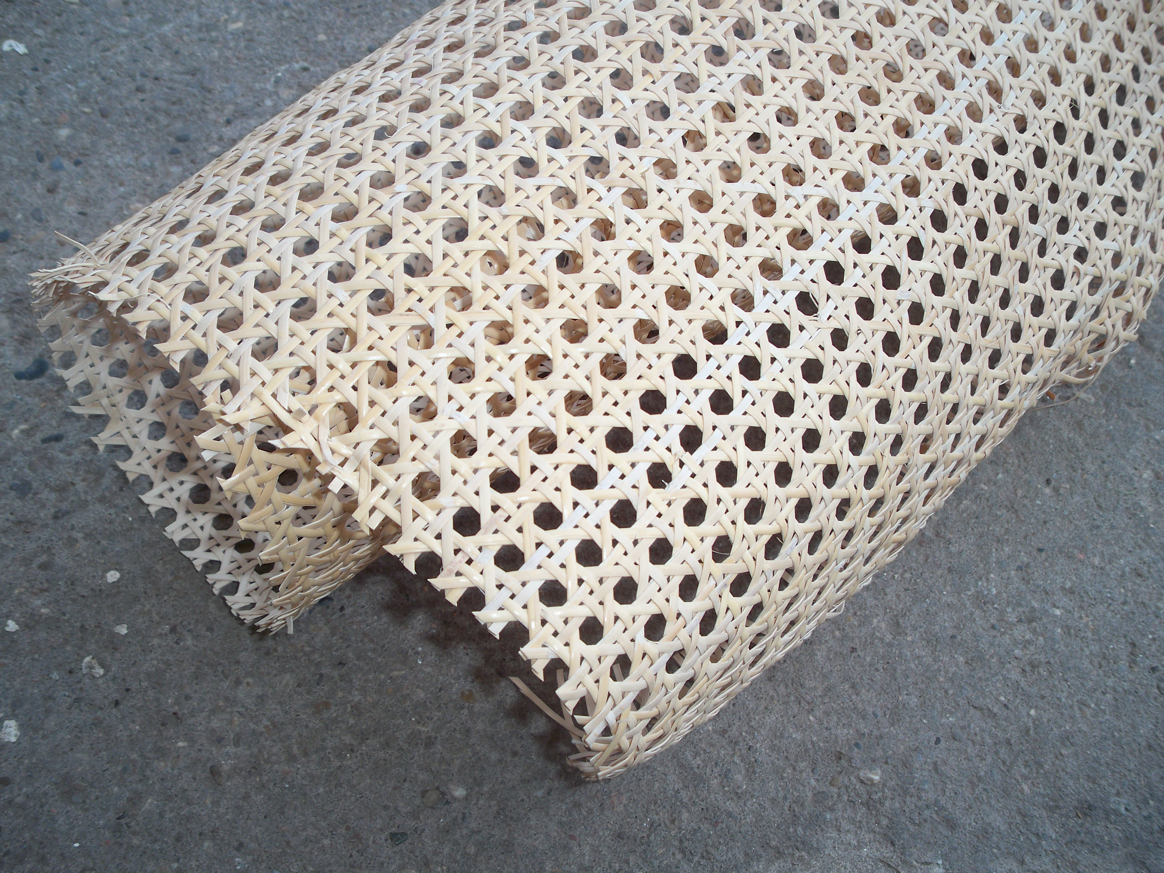 mata przemyslowa